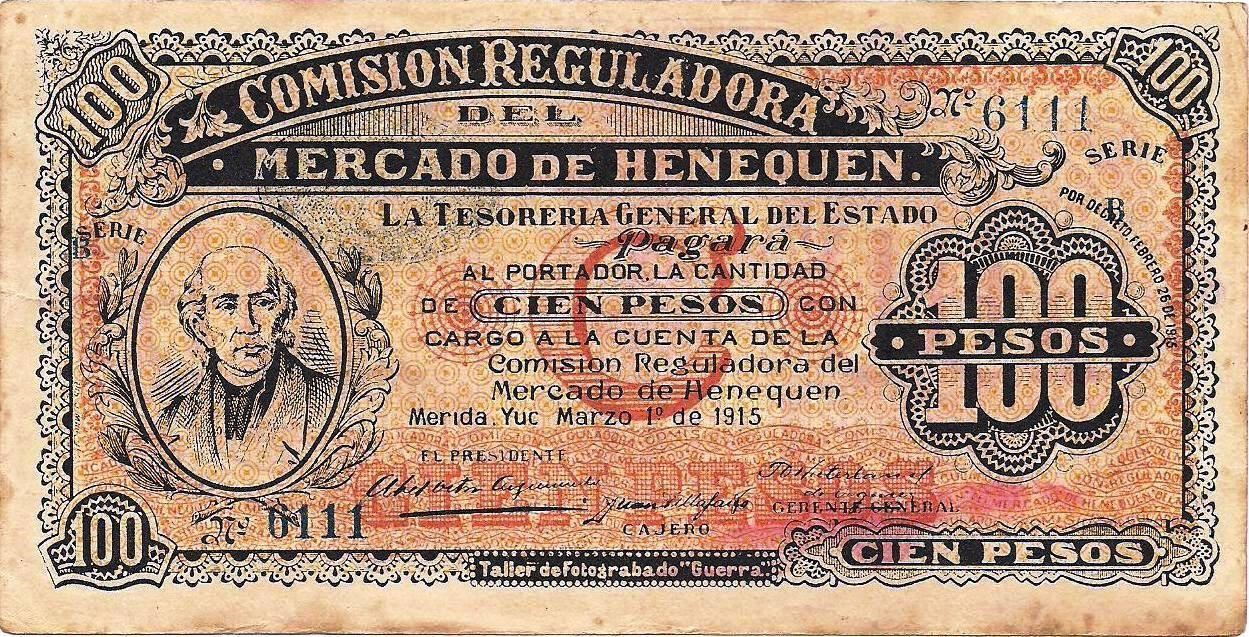 Billete de la Comisión Reguladora del Henequén (1915) con un valor de 100 pesos.